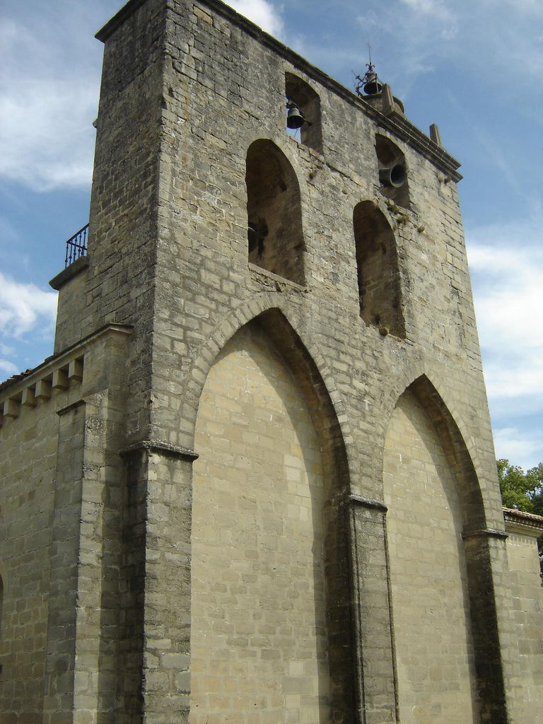 Tuesta